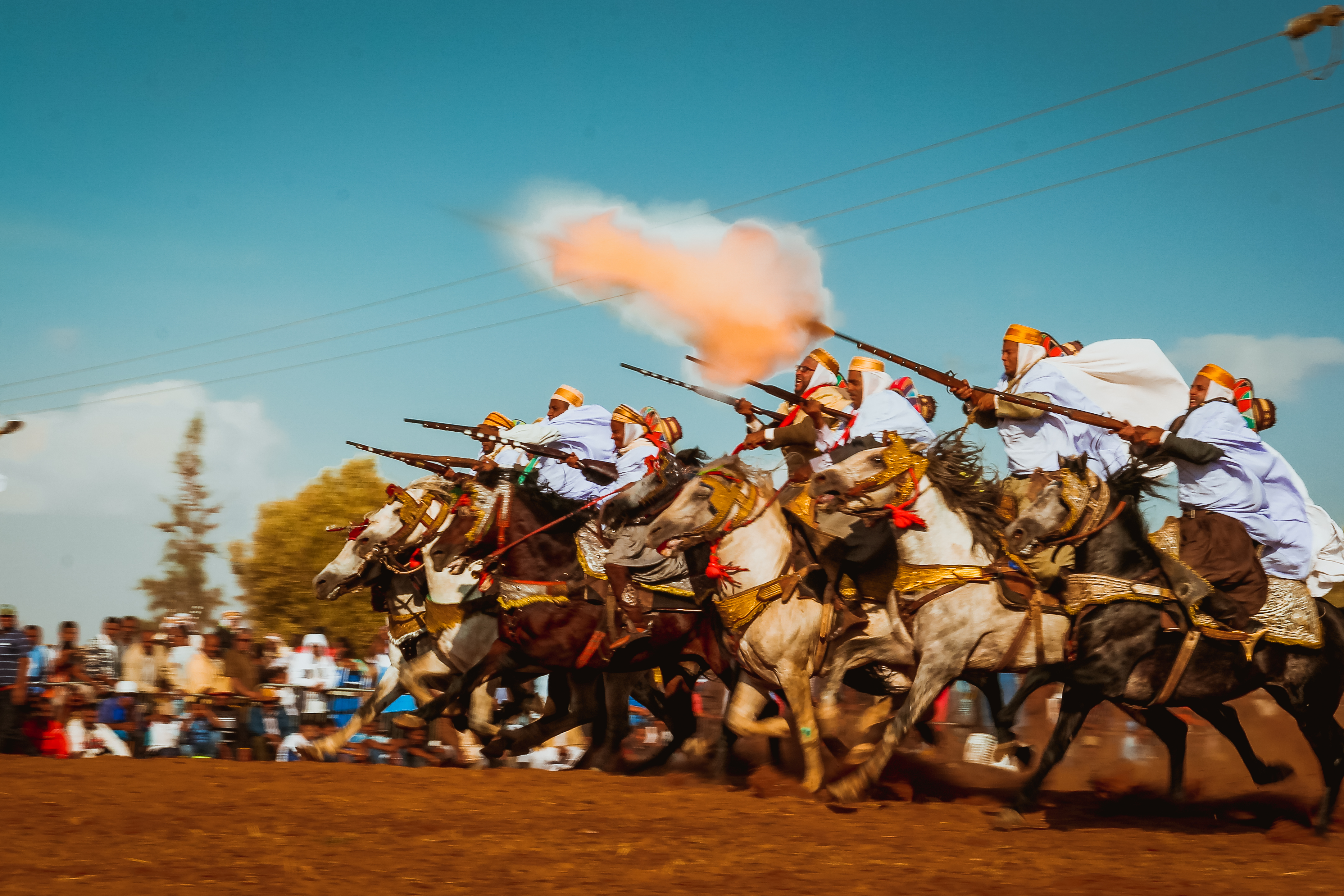 Au petit village d'Ain Larba à la wilaya de AIn Temouchen, chaque 1er novembre, une waada est organisé, differetns specatalces équestres appelés jeu de la poudre This is an image of music and dance from Algeria